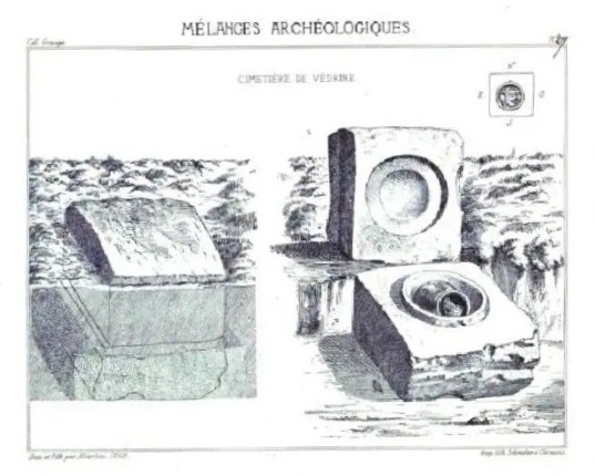 Messeix, Puy-de-Dôme, France. Coffre funéraire à incinération gallo-romain. en pierre. Dessin par G. Grange, Mélanges archéologiques ou recueil de dessins, vases, sceaux, monnaies et fragments antiques trouvés dans différentes localités d'Auvergne, accompagnés de quelques notes en regard, Clermont Ferrand, impr. de Ferdinand Thibaud, 1857, planche 29.